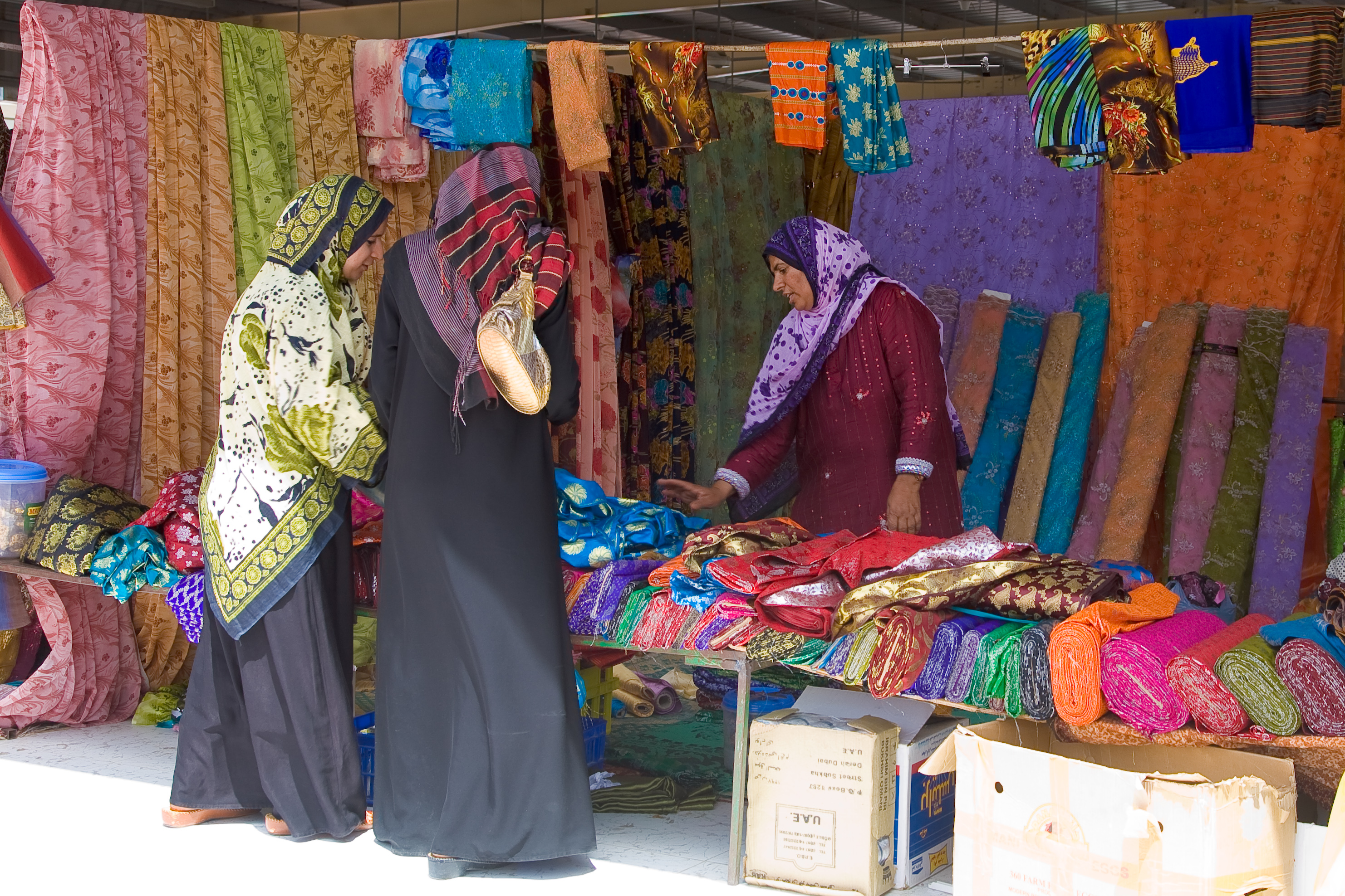 Market in Sinaw, Oman